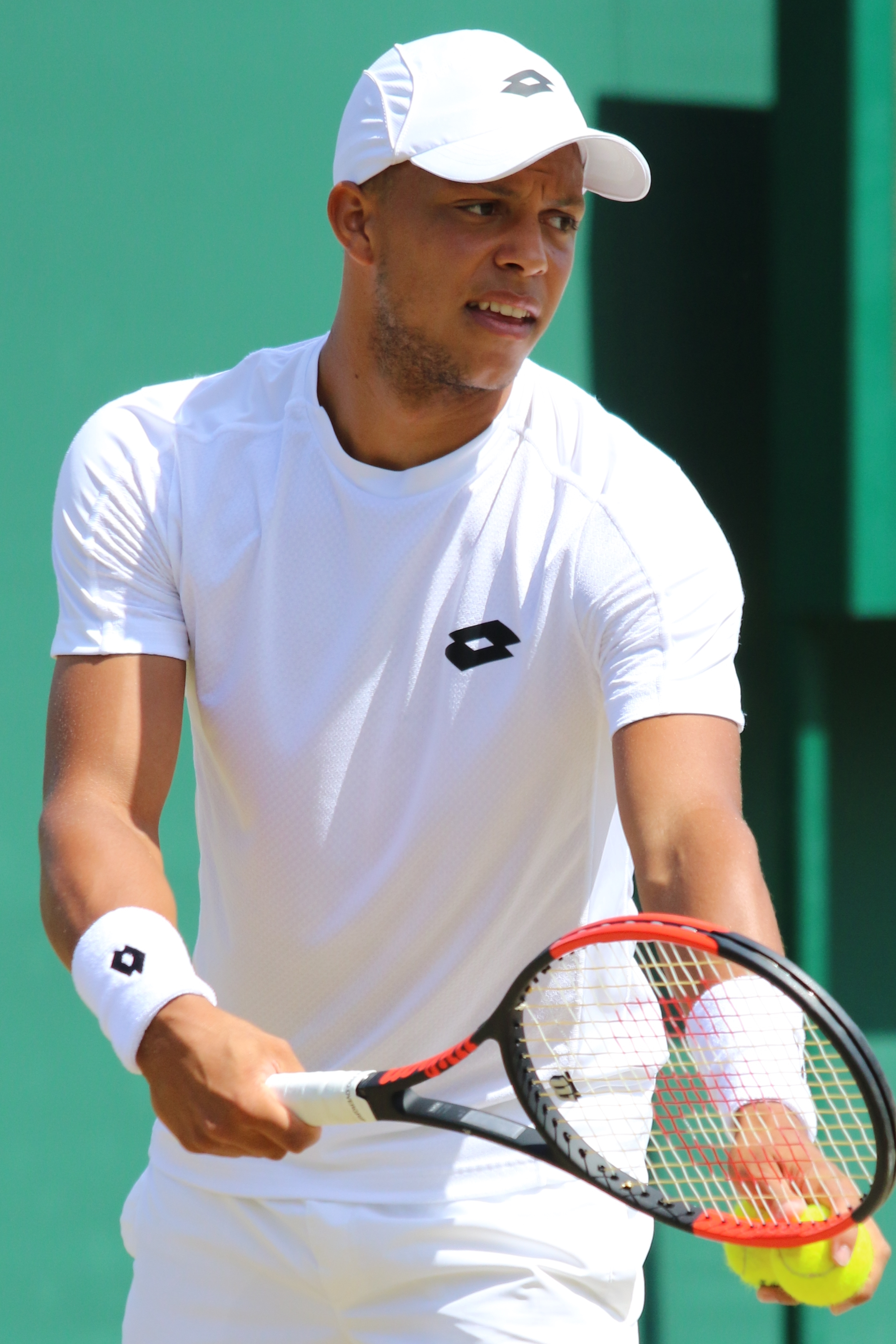 Clarke WM17 (22)